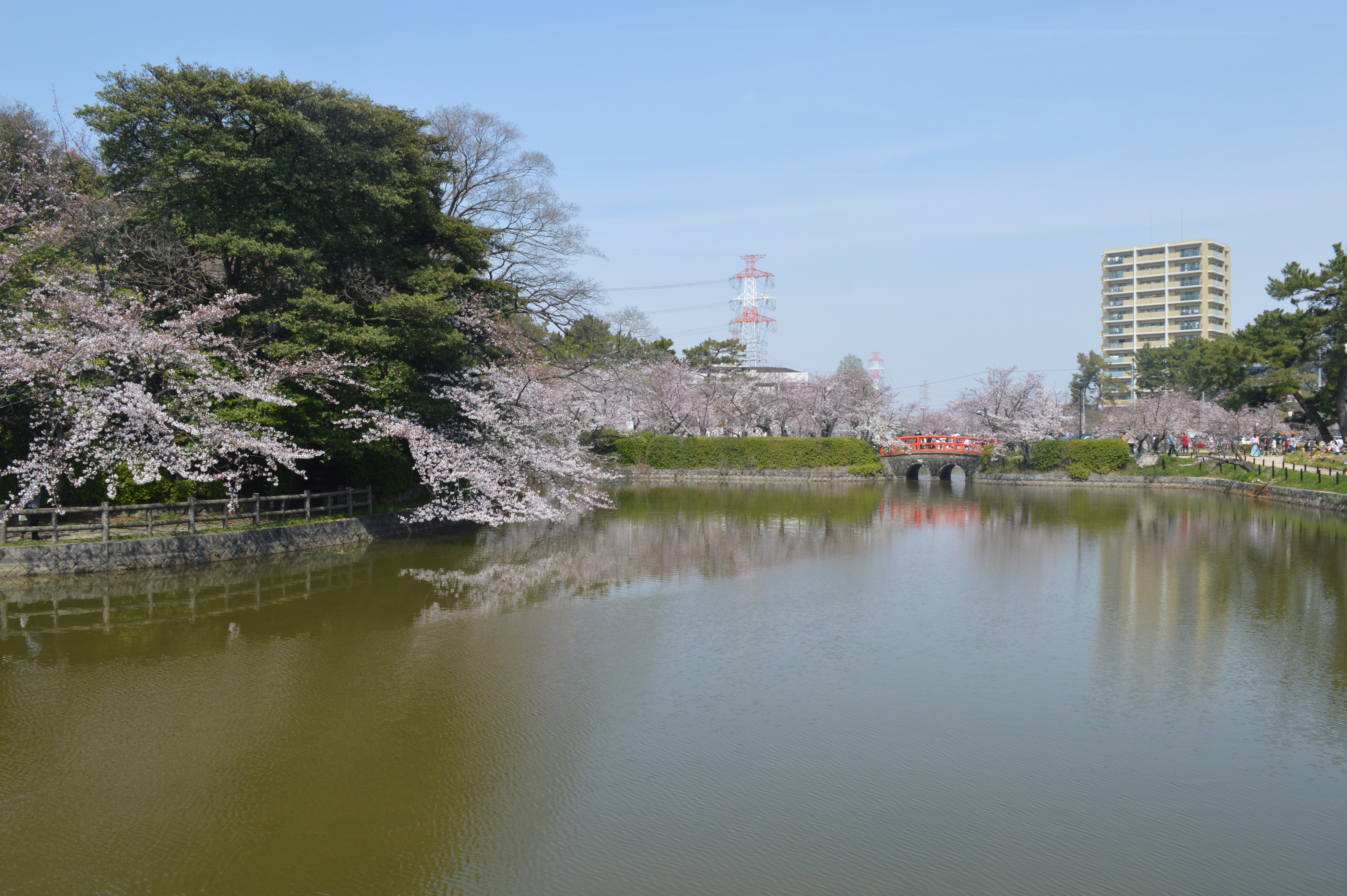 愛知県刈谷市の亀城公園